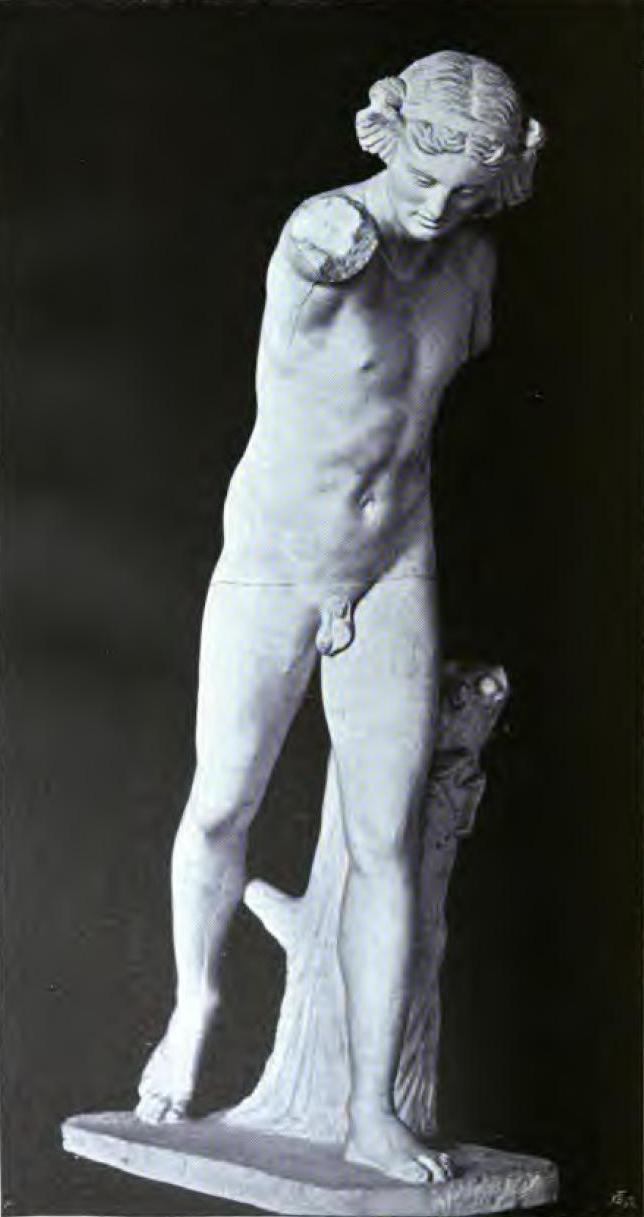 Statue des Hypnos Madrid(O) / Comunidad de Madrid, Museo Nacional del Prado